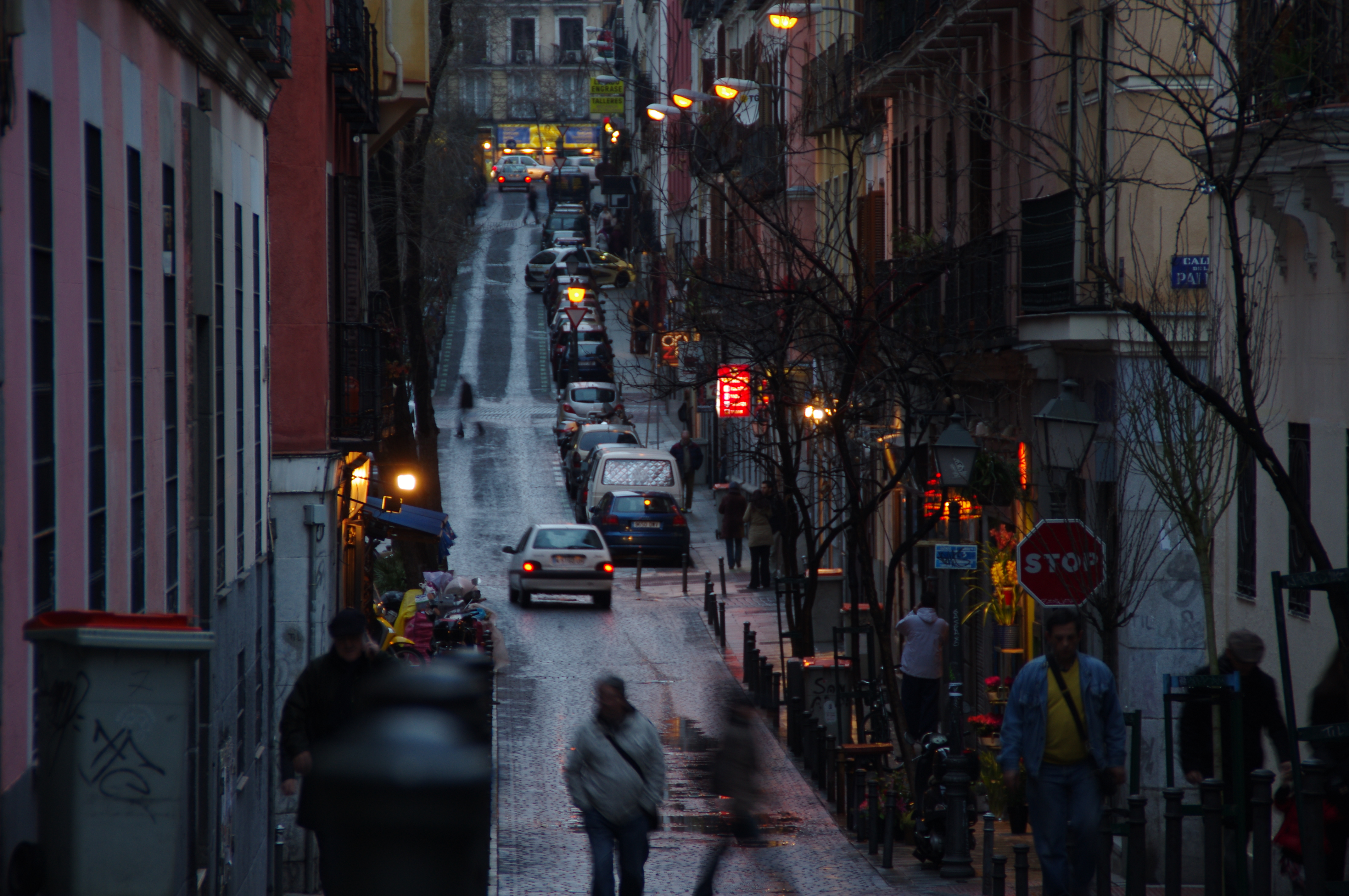 Calle de San Andrés, Madrid, España.